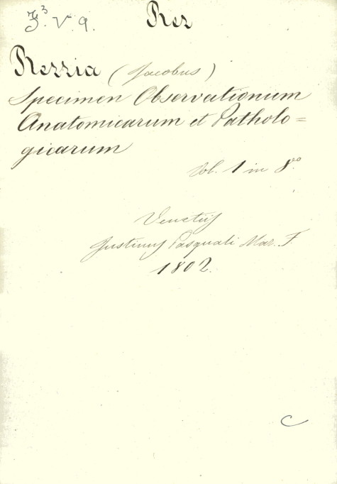 Frontespizio dell'opera dell'anatomista Giacomo Rezia "Specimen observationum anatomicarum et pathologicarum".